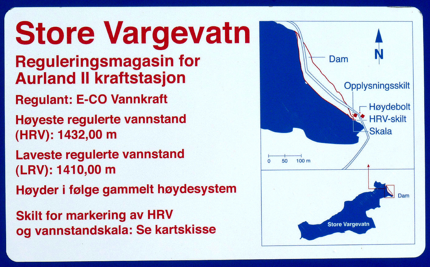 Bilde av opplysningsskiltet som står ved demningen.